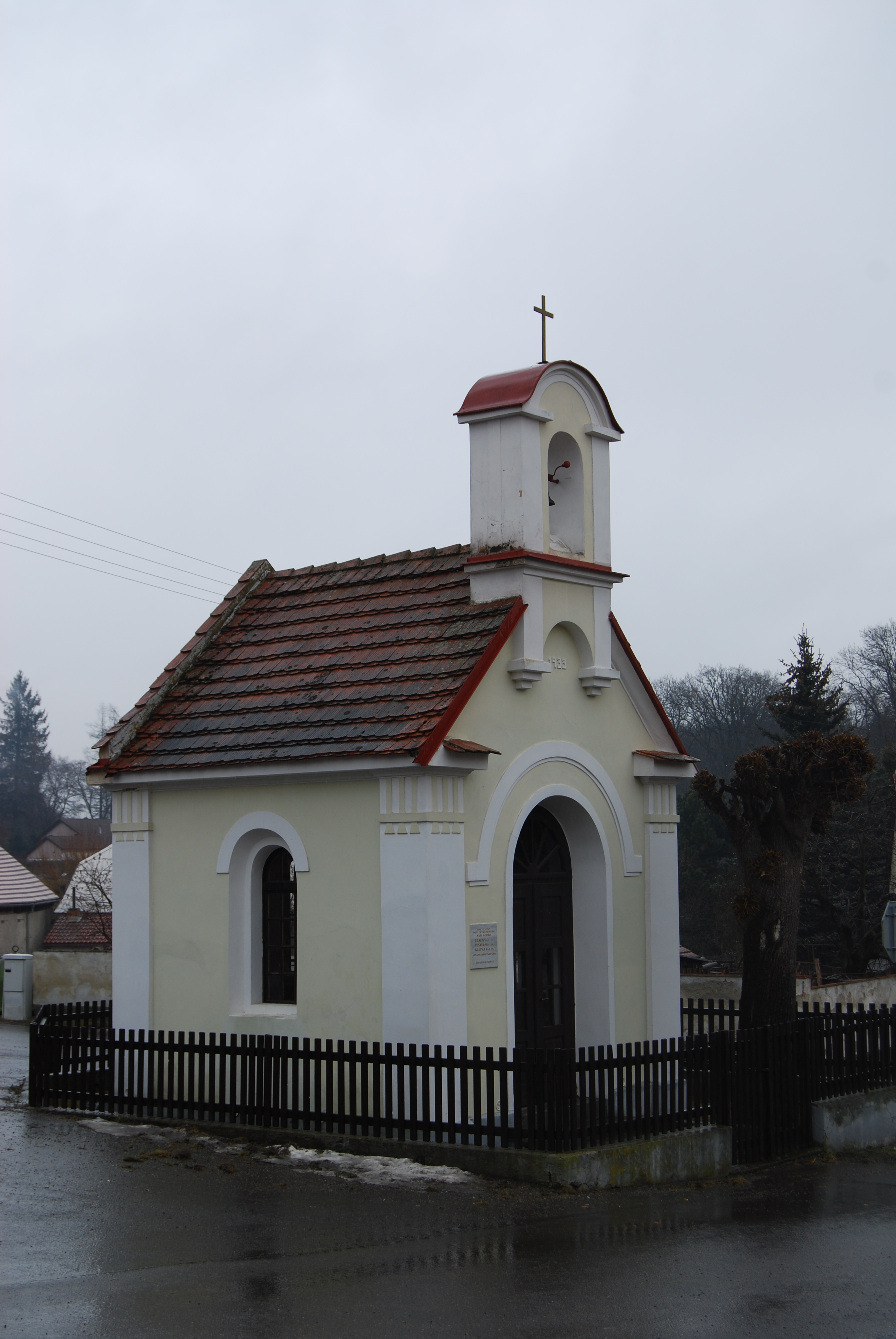 Návesní kaple z roku 1933. Kožlí (okres Písek). Česká republika.